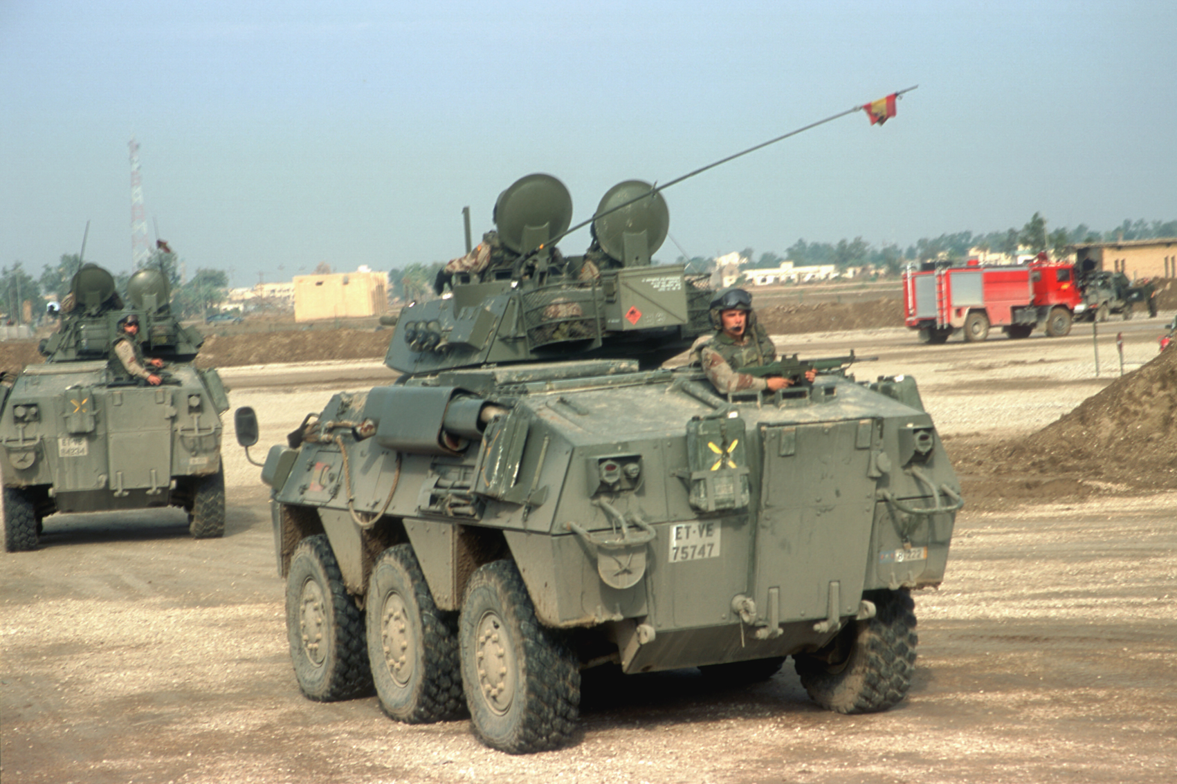 Santa Bárbara Sistemas VEC (Vehículo de Exploración de Caballería)